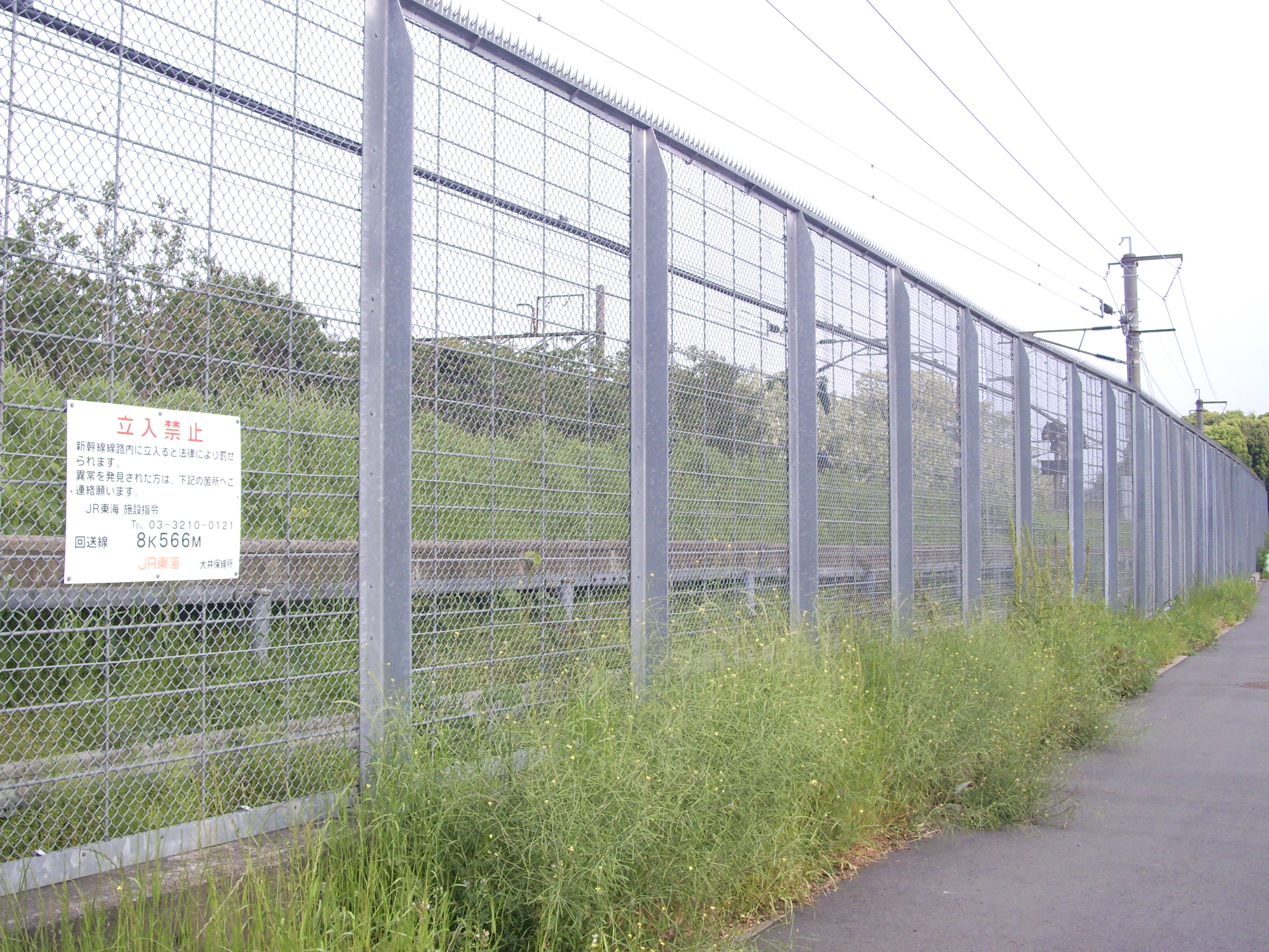 東海道新幹線大井車両基地引き込み線：土路盤区間 ㊟カメラを起動すると日付機能が出荷時のものに初期化されるため、ファイル履歴の撮影日時とメタデータの原画像データの生成日時が異なります